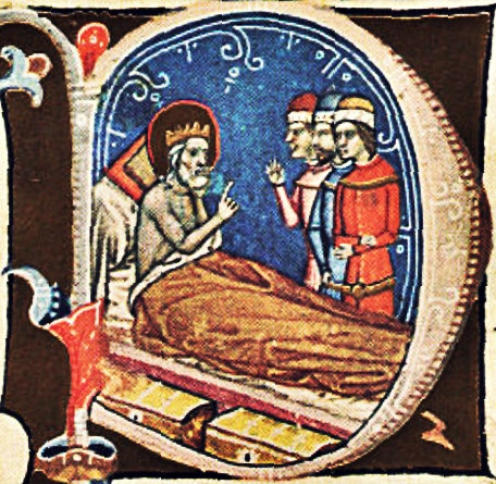 Stephen I's death